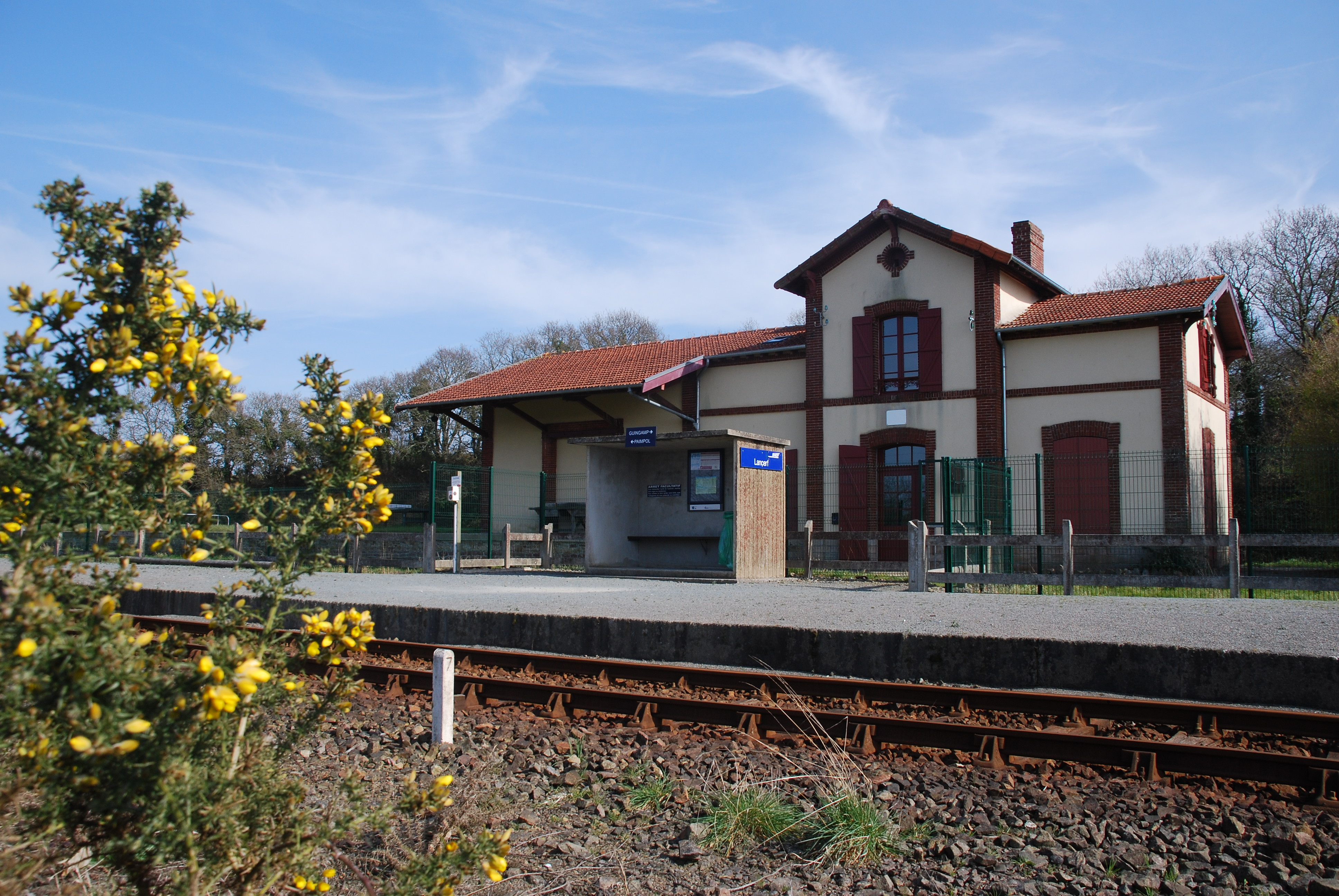 Ti-gar Lanserv